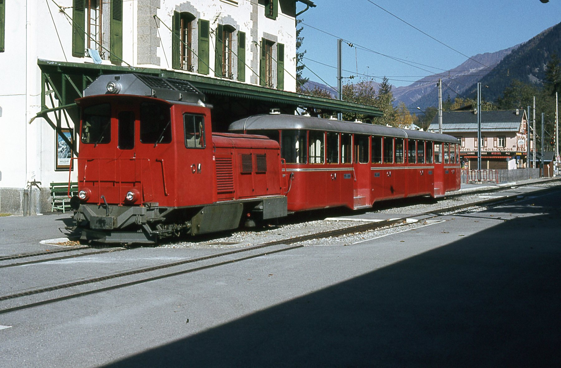 Rame du diesel de Montenvers en gare de Chamonix (Haute-Savoie, France).